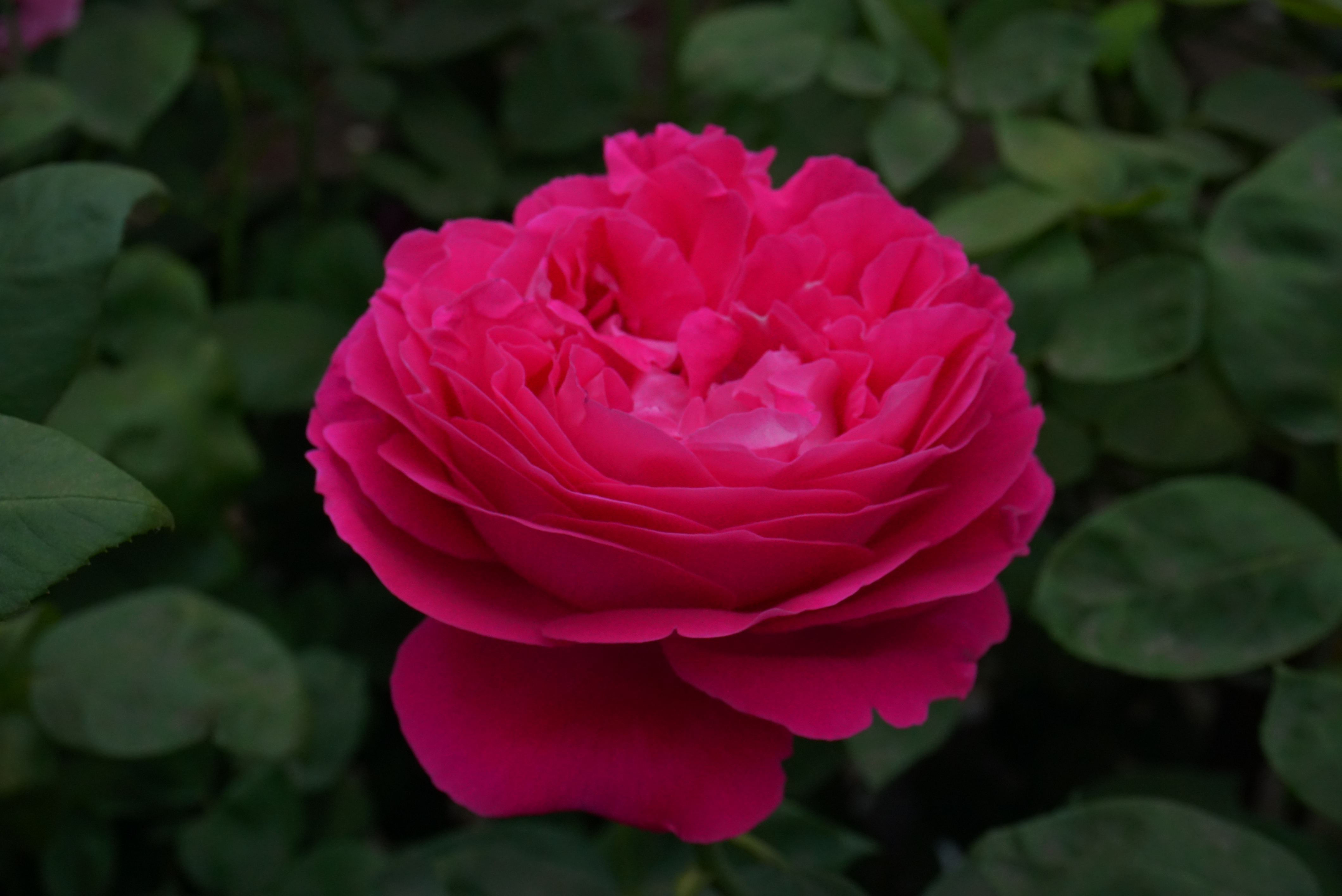 『ポール・ネイロン』（1869年）ルヴェ作出。秋田県大館市・石田ローズガーデンにて